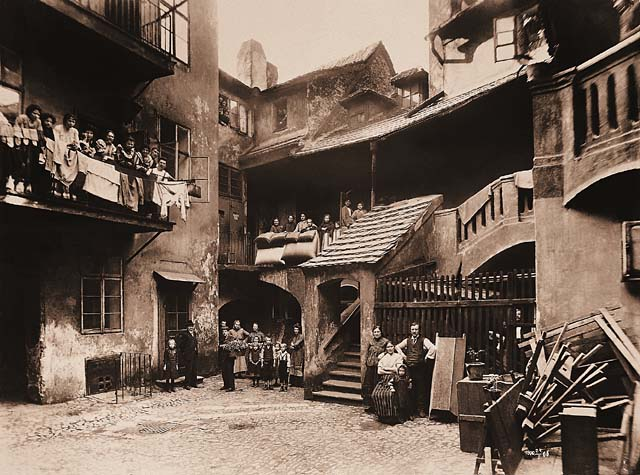 Stavební zchátralost a bizarní nahuštěnost Josefovské zástavby včetně nezdravé přelidněnosti, které byly hlavními oficiálními důvody asanačního zásahu, jsou patrné ze snímků josefovských dvorků a zákoutí.